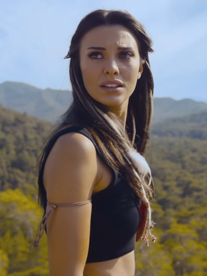 Sen Sağ Ben Selamet - Teaser'ından Tuvana Türkay'ın tek başına olduğu bir kare.